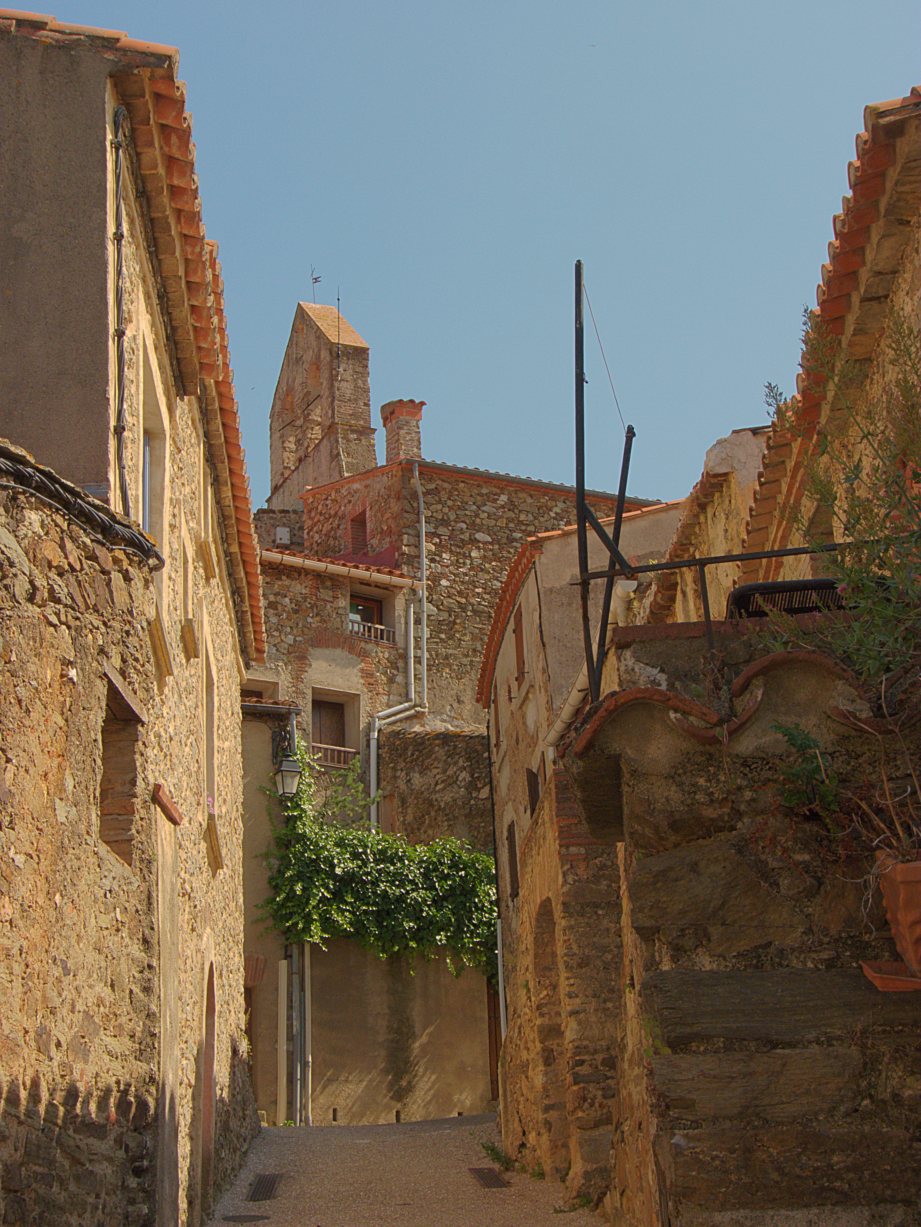 Rue en direction de la placette des Pedrissos, Calmeilles (Pyrénées-Orientales, Languedoc-Roussillon, France)